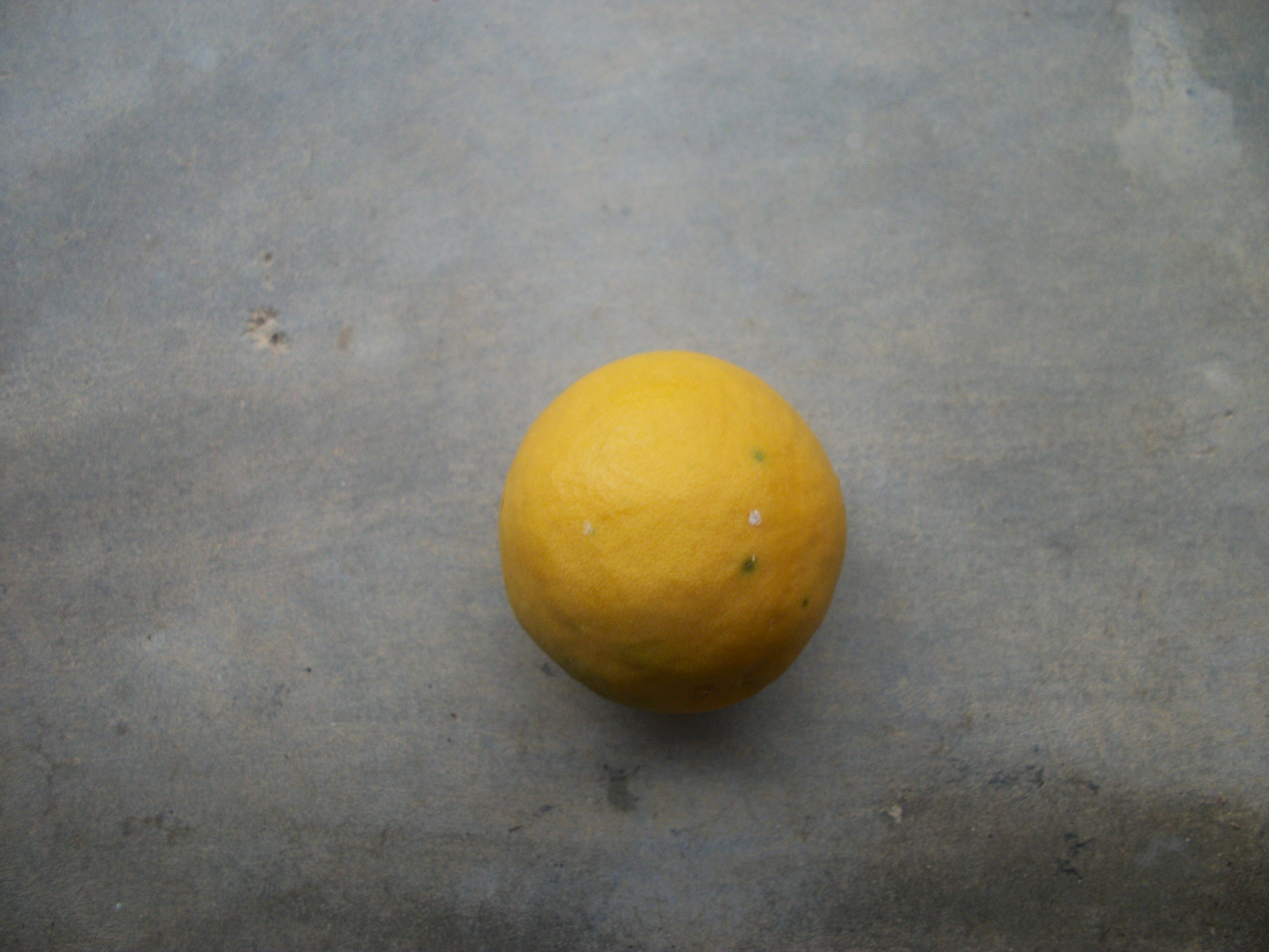 Trapiá, fruta regional da caatinga